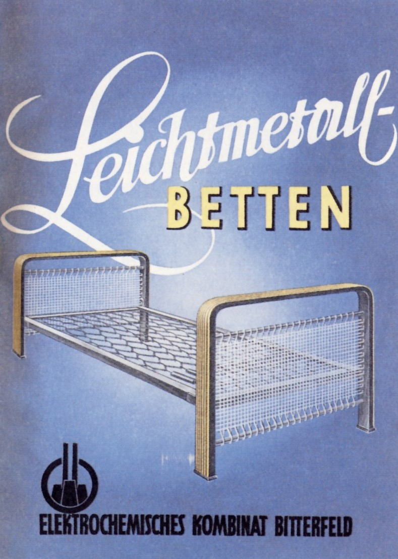 Nach 1945 wurde in einem Notprogramm die Produktion von Massenbedarfsgütern aus Aluminium- und Magnesium-Legierungs-Schrott aufgenommen